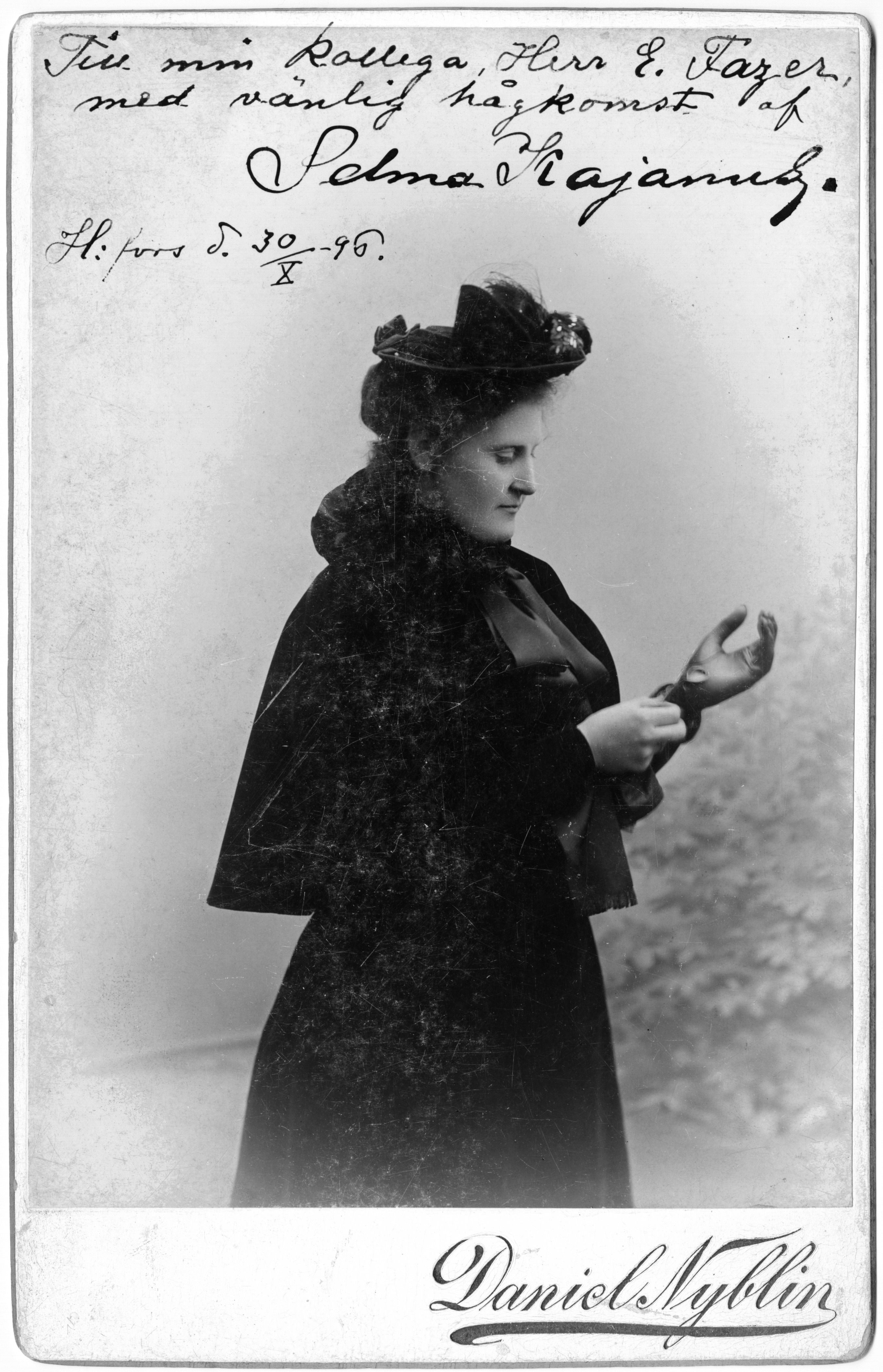 Selma Kajanus; Selma Kajanus. HKO:n muusikko -- , paperi pahvi, mv